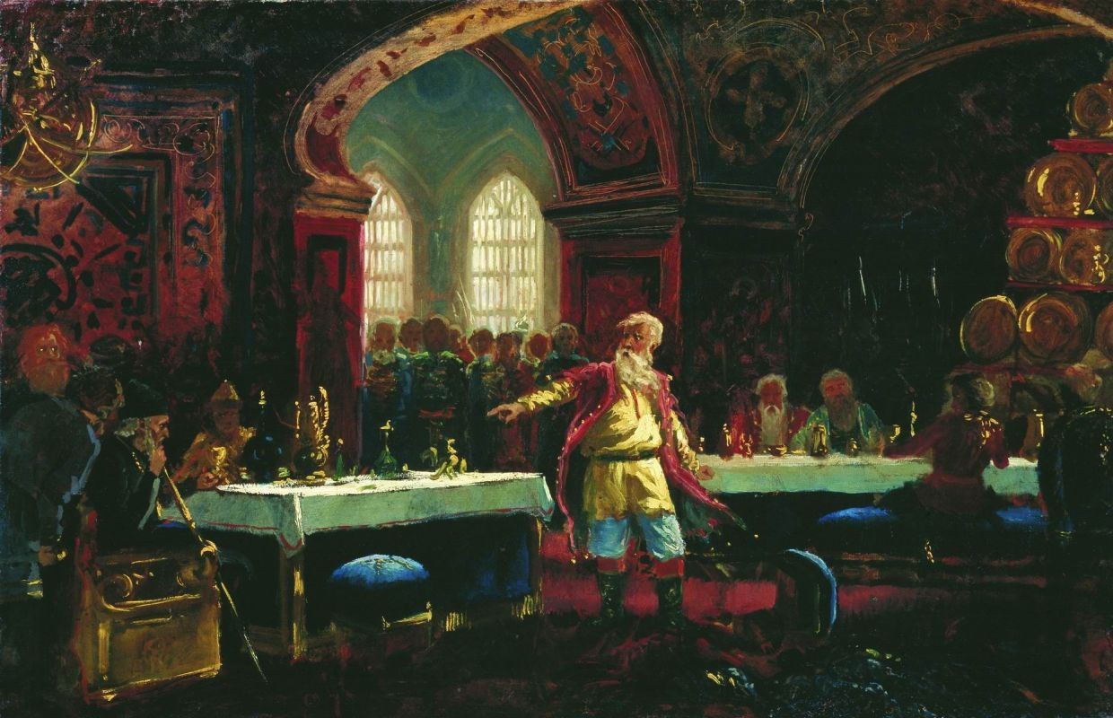 К.Е.Маковский. Князь Репин на пиру у Ивана Грозного. 1880-е Возможно, задумал Константин Маковский большую композицию на тему из русской истории, но по неизвестным причинам не написал ее. Остался этот выразительный эскиз и, что особенно оценили современники, со всеми реалистическими подробностями воссоздающий быт и нравы времен Ивана Грозного. Героем художник сделал не царя, а князя Михаила Петровича Репнина, чей род происходил от святого Михаила, князя Черниговского. Прославился Репнин походом в Ливонию в 1558 году, а позже стал жертвой борьбы Ивана Грозного с боярами. Маковский обратился к рассказу Алексея Курбского: на "маскированный вечер" пригласил Иоанн IV Михаила Петровича и со словами: "Веселись с нами" надел на него шутовскую маску. Репнин сорвал и растоптал маску, а по прошествии нескольких дней был убит в церкви.